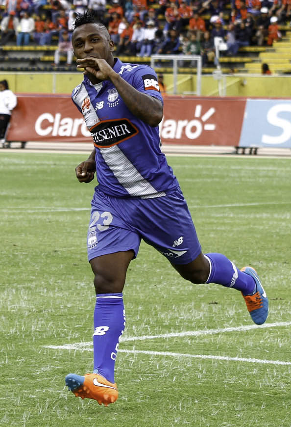 Quito, 15 mar (ANDES).- Por la séptima fecha del Campeonato Nacional de Fútbol se enfrentaron los equipo de El Nacional (rojo) y Emelec (azul) en el estadio Olímpico Atahualpa. Foto: Micaela Ayala V./ANDES